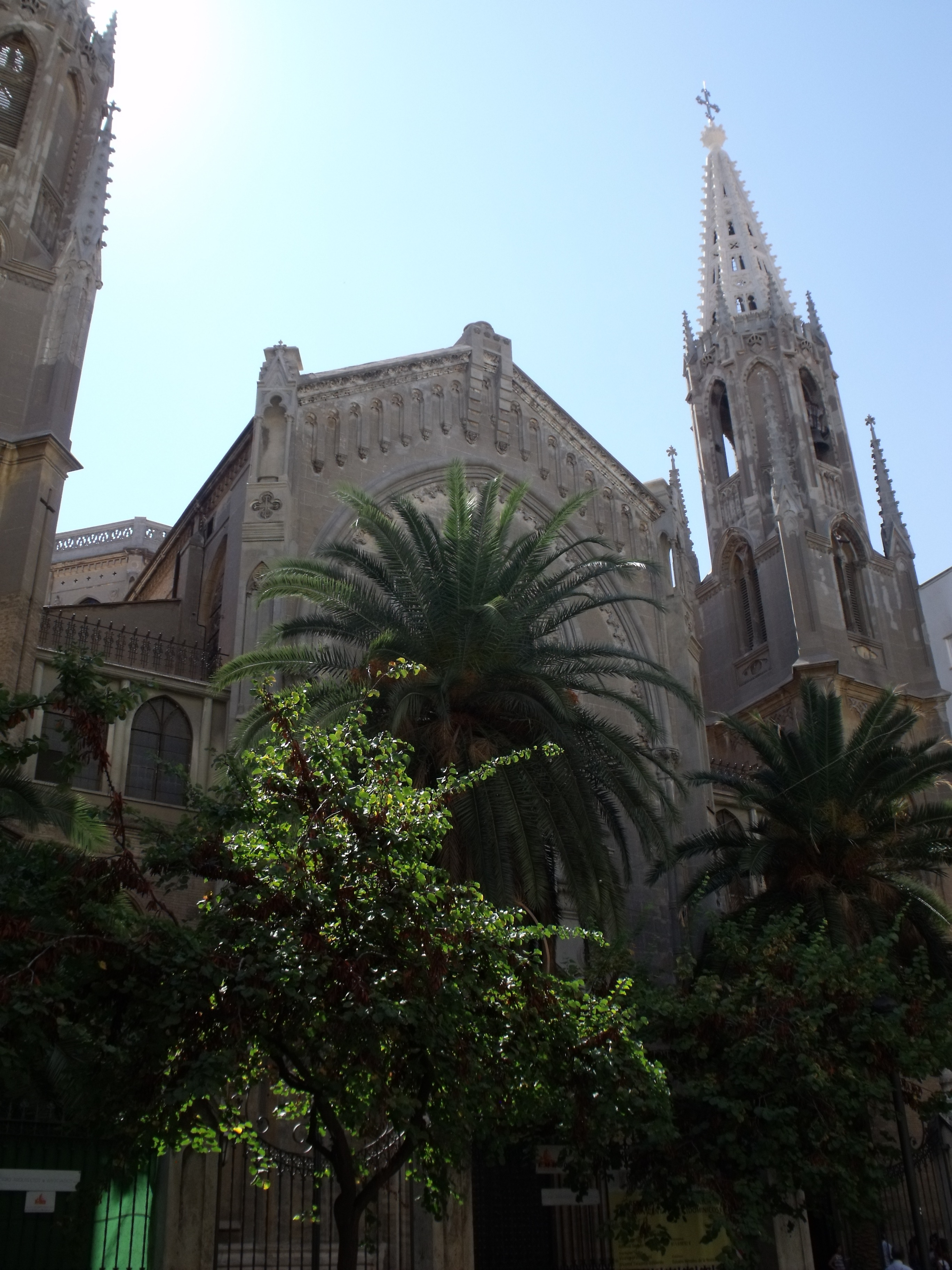 Basílica de San Vicente Ferrer o Iglesia del Convento de los Dominicos, Valencia.